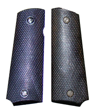 Grips originales Fornalit de los dos tipos. Con y sin refuerzo en el paso de los tornillos.